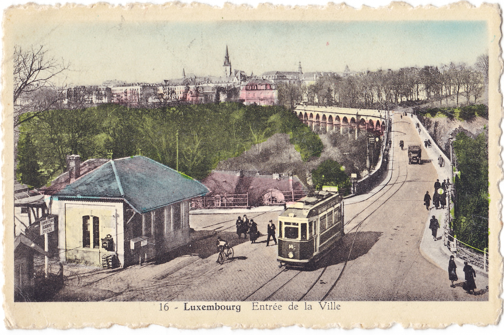 Carte postale ancienne éditée par L'Heembeekoise, n°16 : LUXEMBOURG - Entrée de la Ville. Motrice n°14.